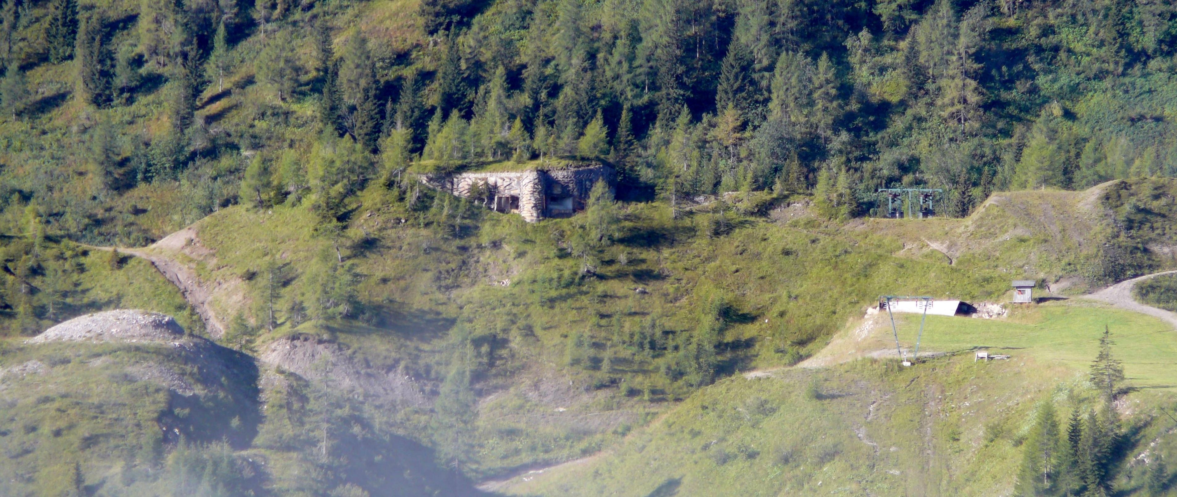 Opera 11 sbarramento passo monte croce di comelico